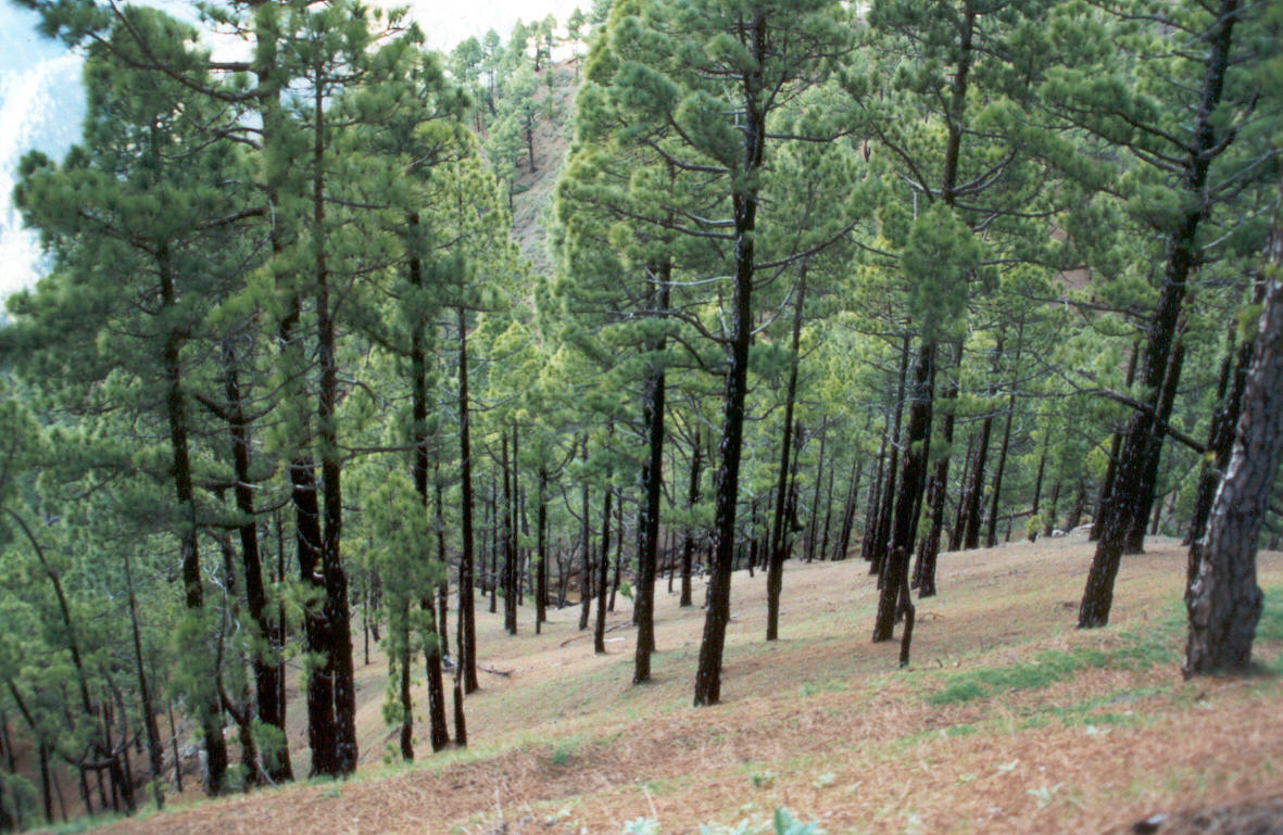 Bosque de pino canario Pinus canariensis con los troncos ennegrecidos por un incendio. Imagen tomada por Fev, el 12 de diciembre de 1999, desde el Mirador de La Cumbrecita (en el borde de la Caldera de Taburiente)